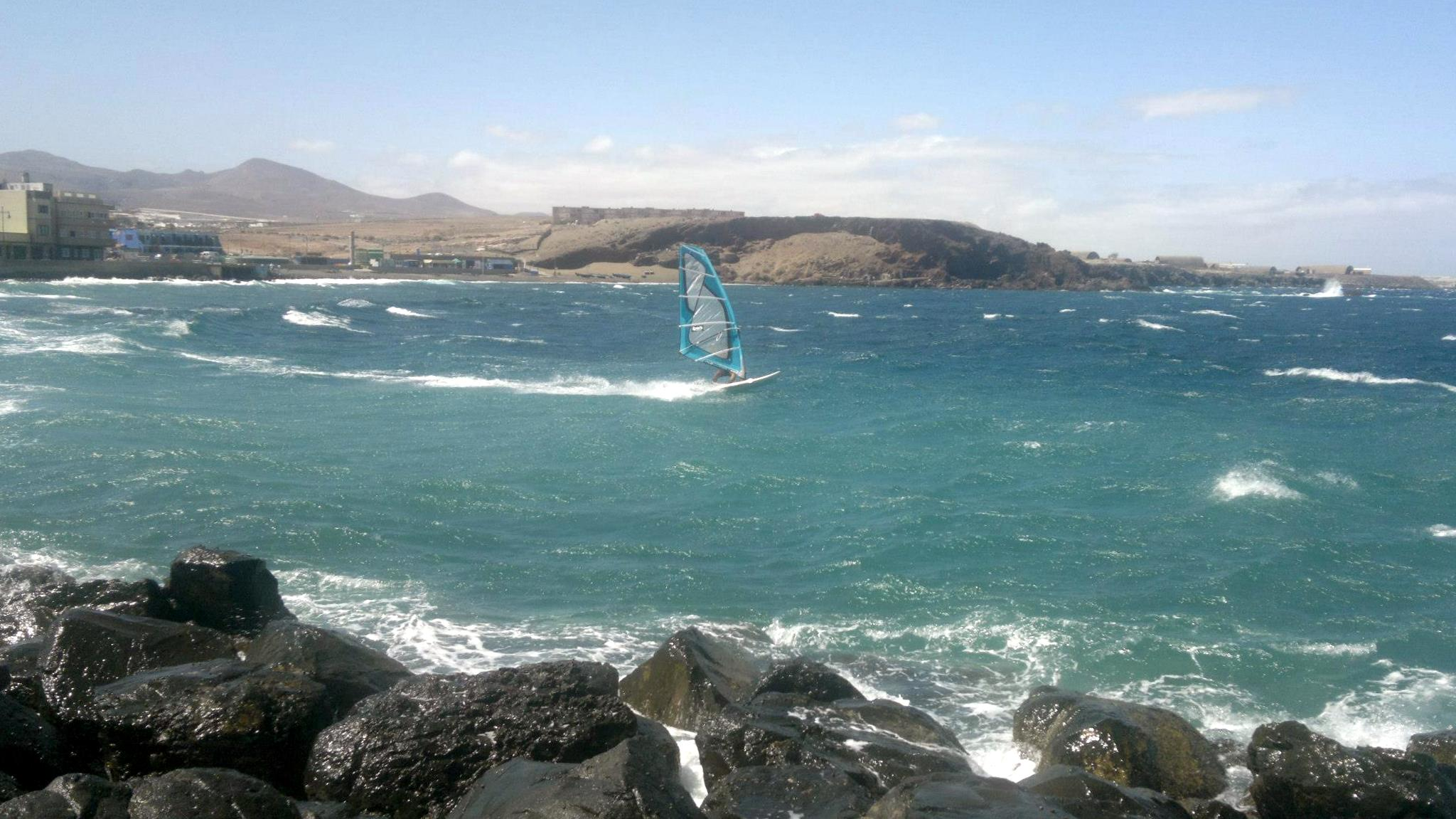 Windsurfista en la playa del Burrero